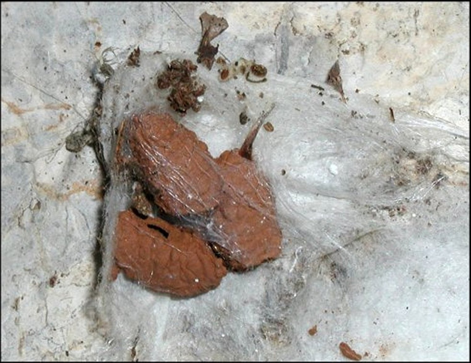 Toile d' Uroctea durandi : cellules en argile contenant des araignées capturées par un Hyménoptère Pompilide ayant choisi cette toile comme cachette.